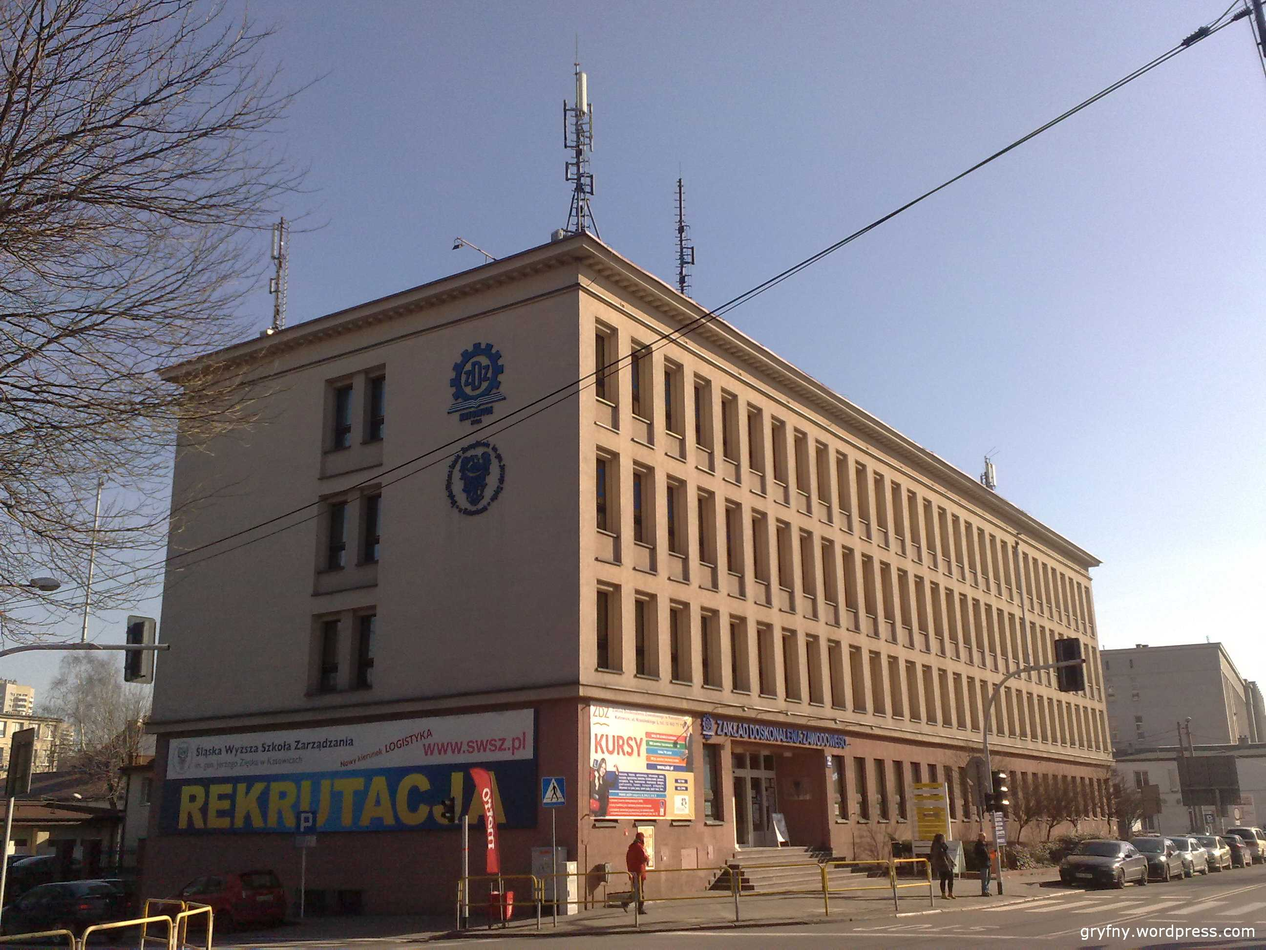 Budynek ZDZ, siedziba ŚWSZ w Katowicach